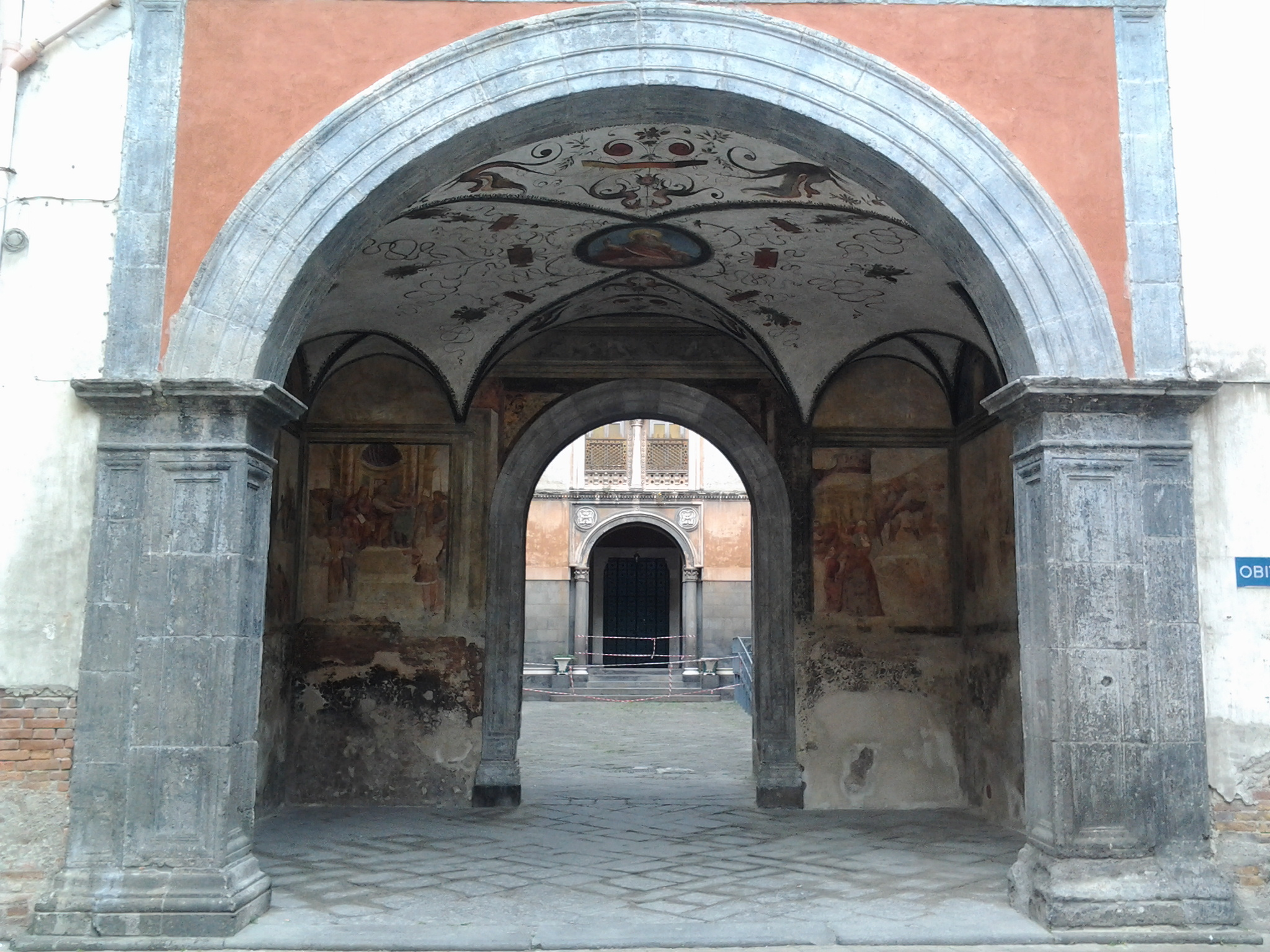 Atrio